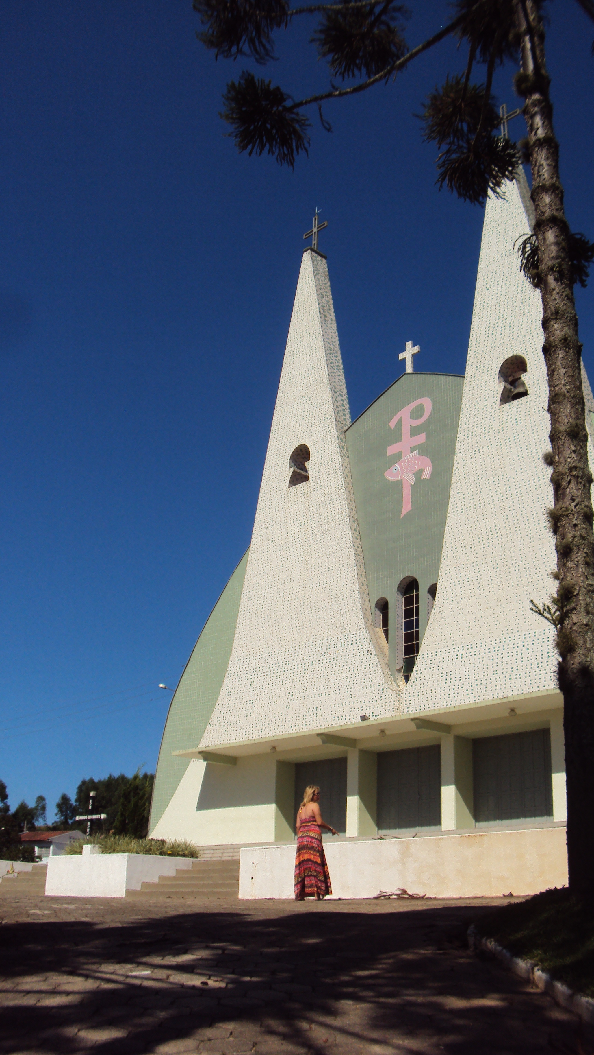 Igreja de Pinheiral, distrito de Braço do Norte